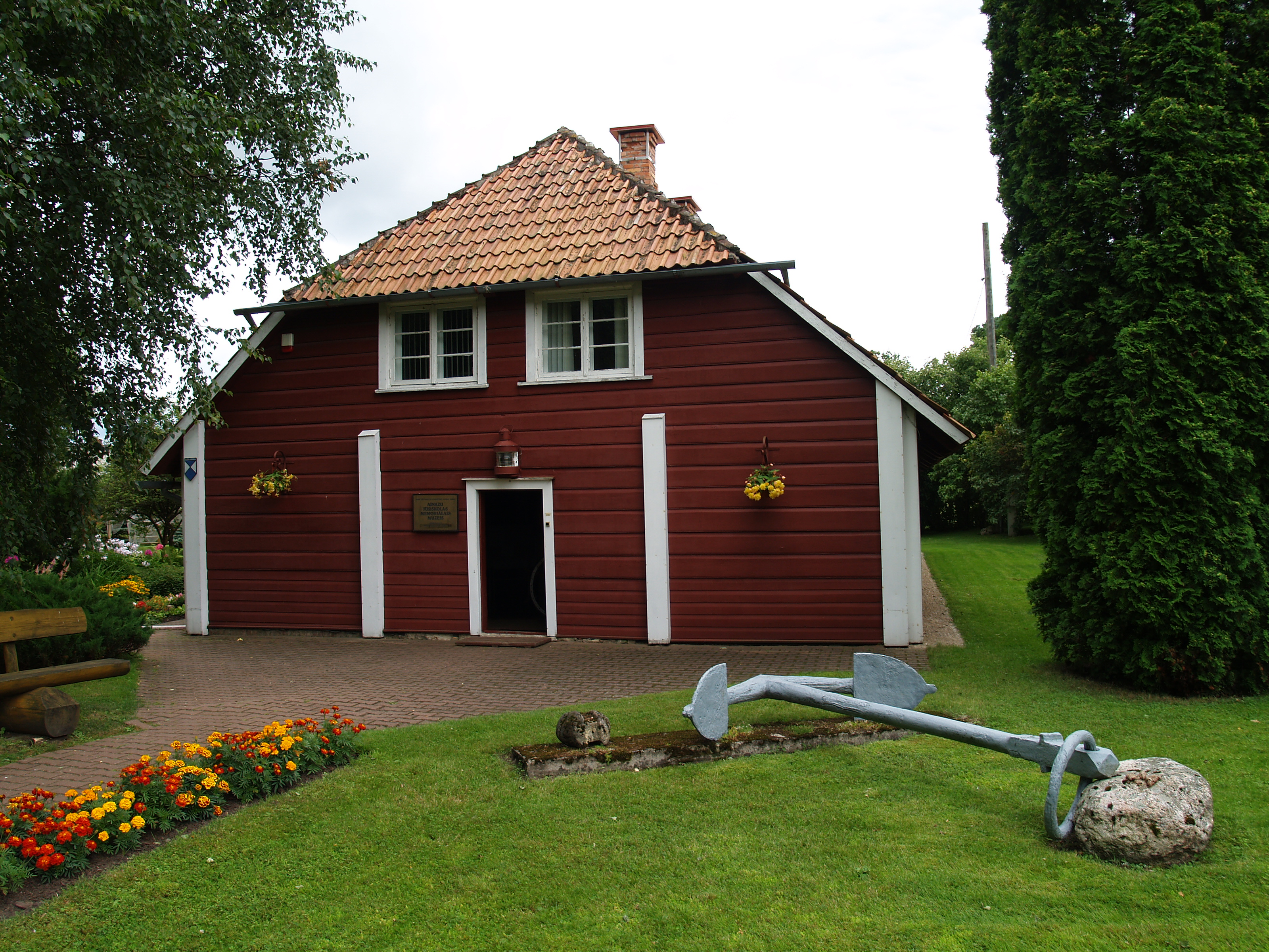 Heinaste merekooli muuseum